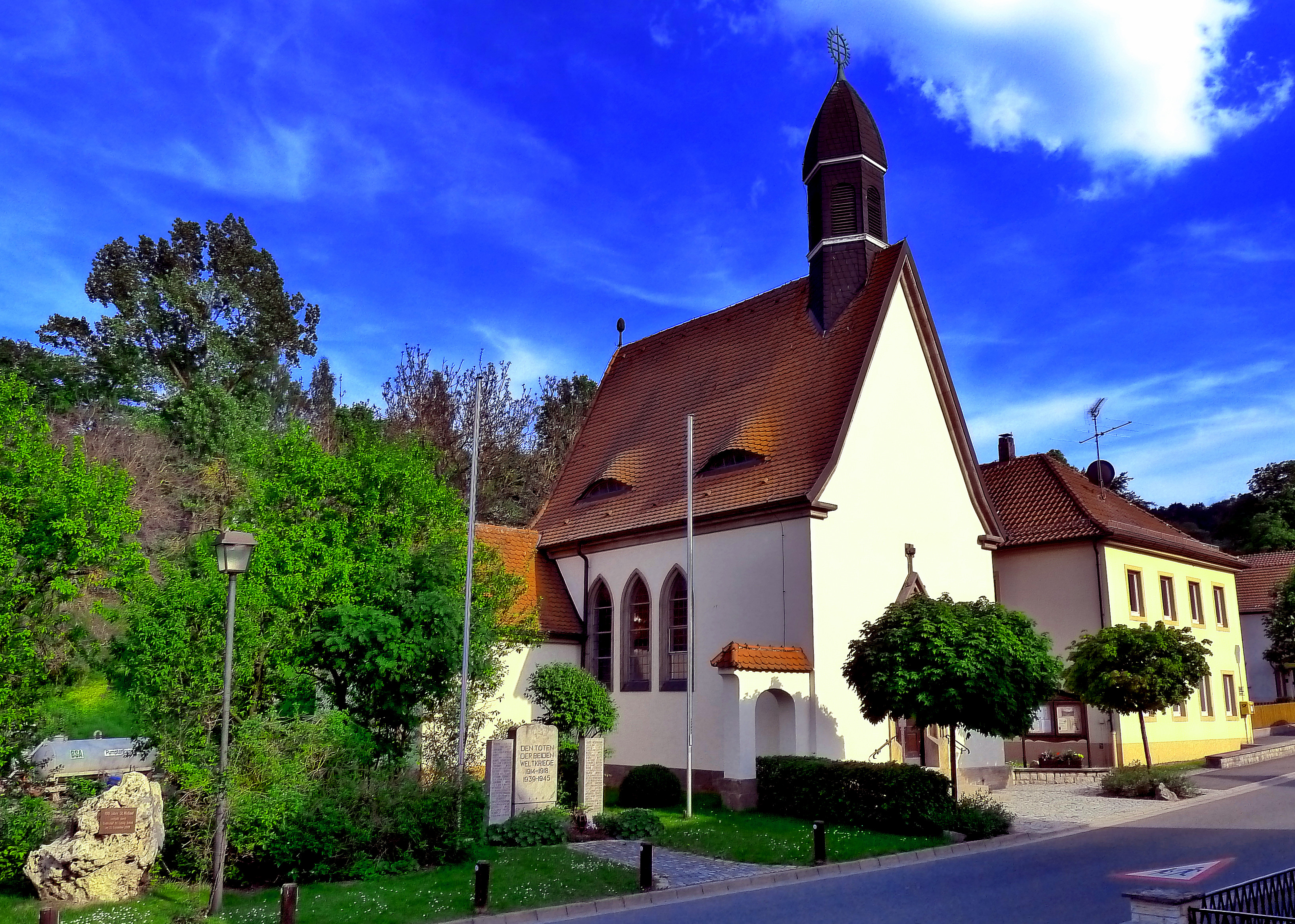 Die katholische Filialkirche St: Michael wurde in den Jahren 1907-1909 erbaut. Im Inneren befindet sich der ehemalige Hochaltar der Sepulturkapelle vom Kloster Langheim.This is a photograph of an architectural monument.